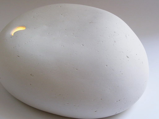 Lidia Boševski: "Stone", 2006. godine, ceramic light, white clay, diam. 18 cm